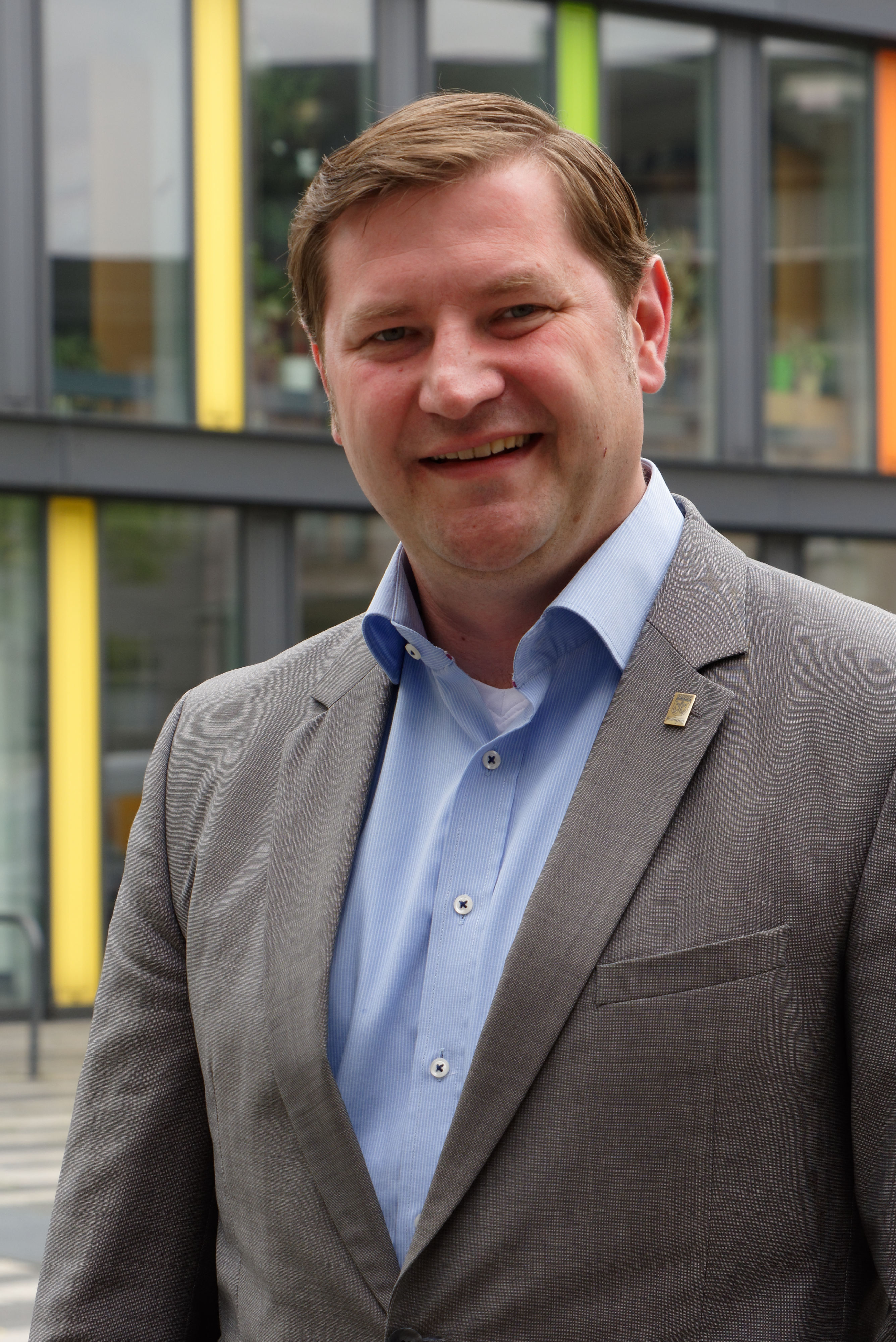 Solingens Oberbürgermeister Tim Kurzbach